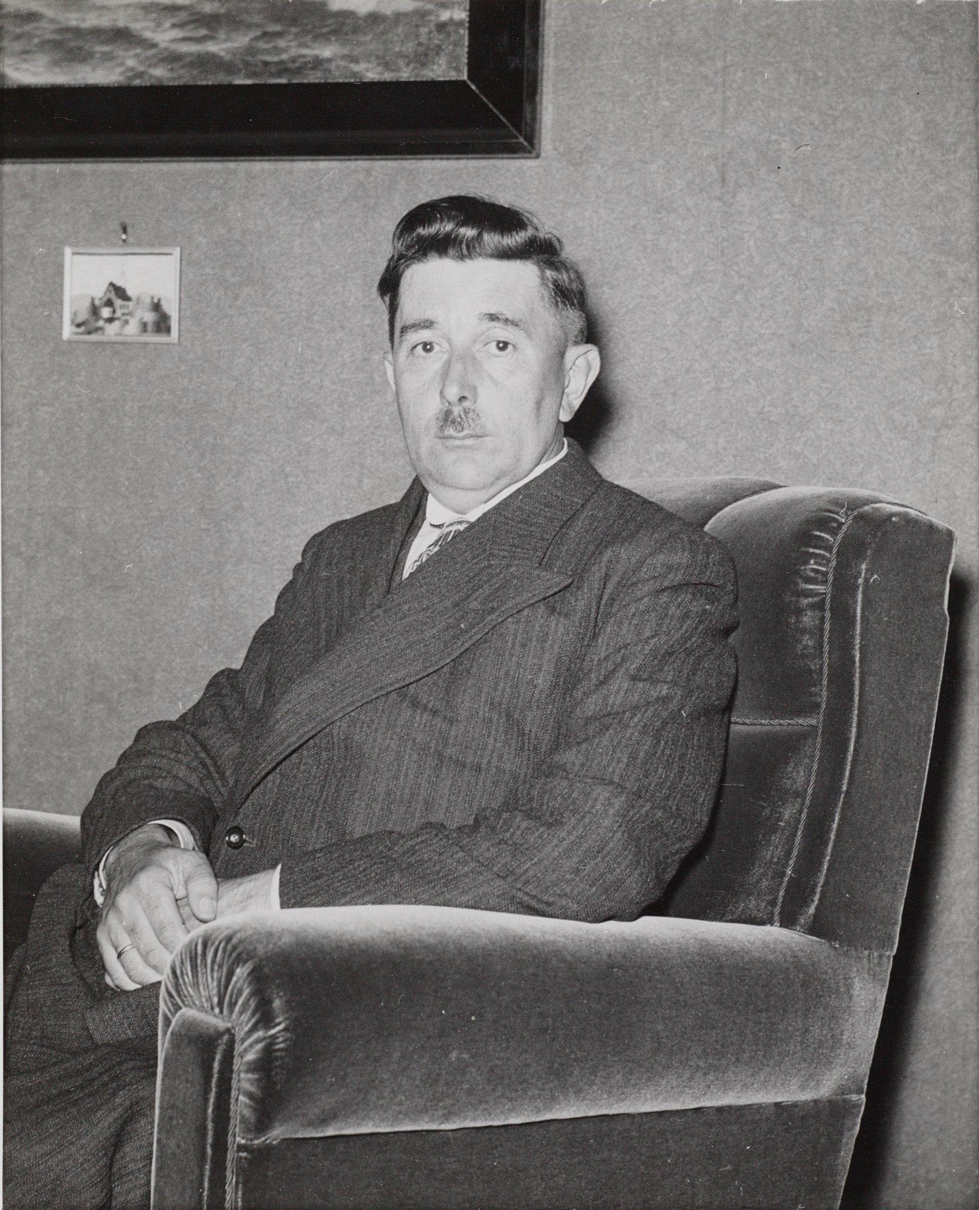 Commissaris van politie Hendrik Voordewind (1887-1972)